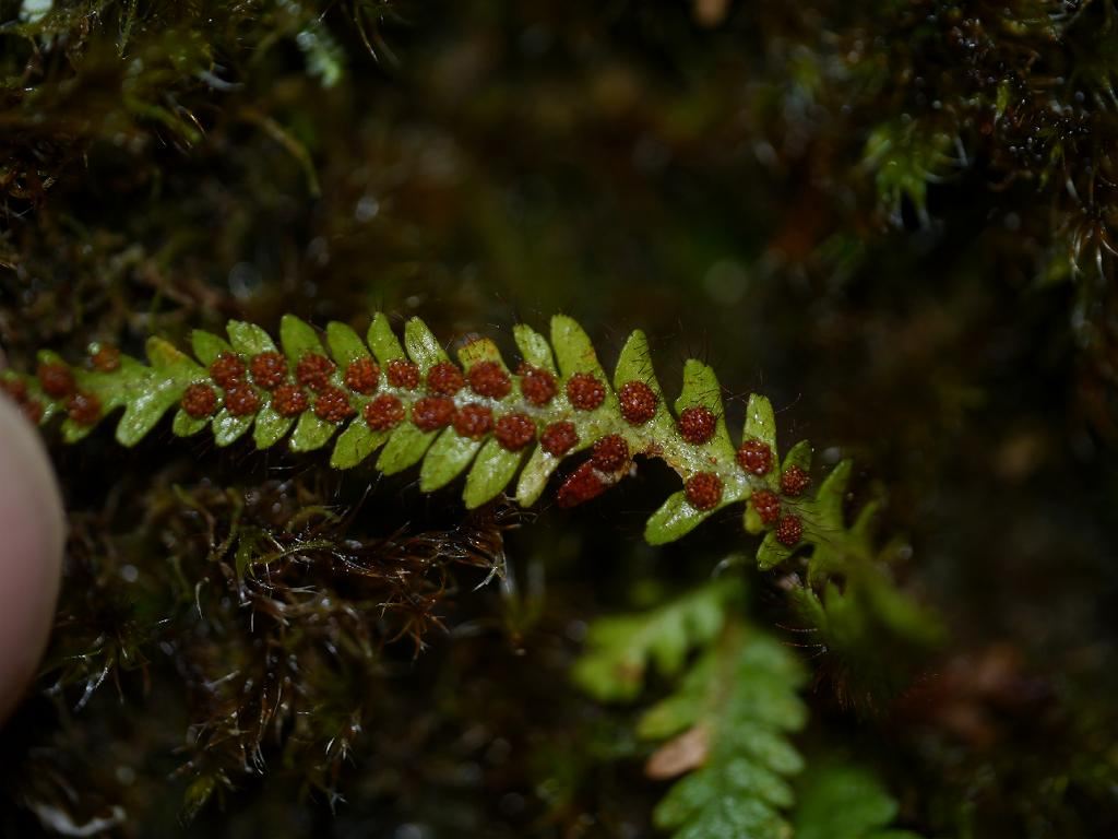 Micropolypodium okuboi：オオクボシダ・胞子嚢群 2014/10/18 和歌山県田辺市：Tanabe City. Wakayama Pref. Japan